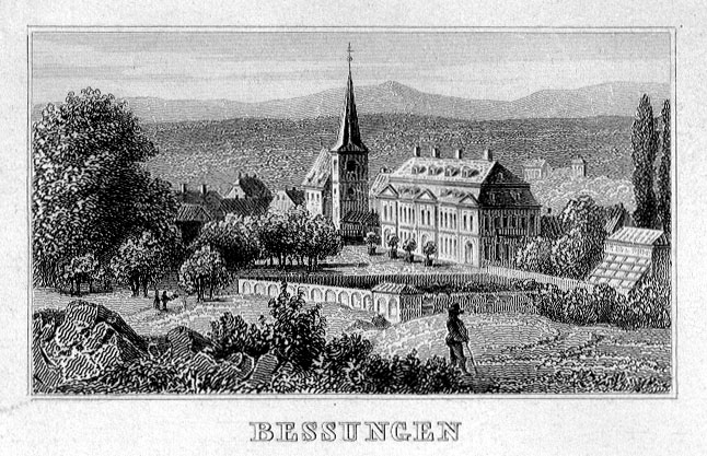 Ansicht von Bessungen um 1849.